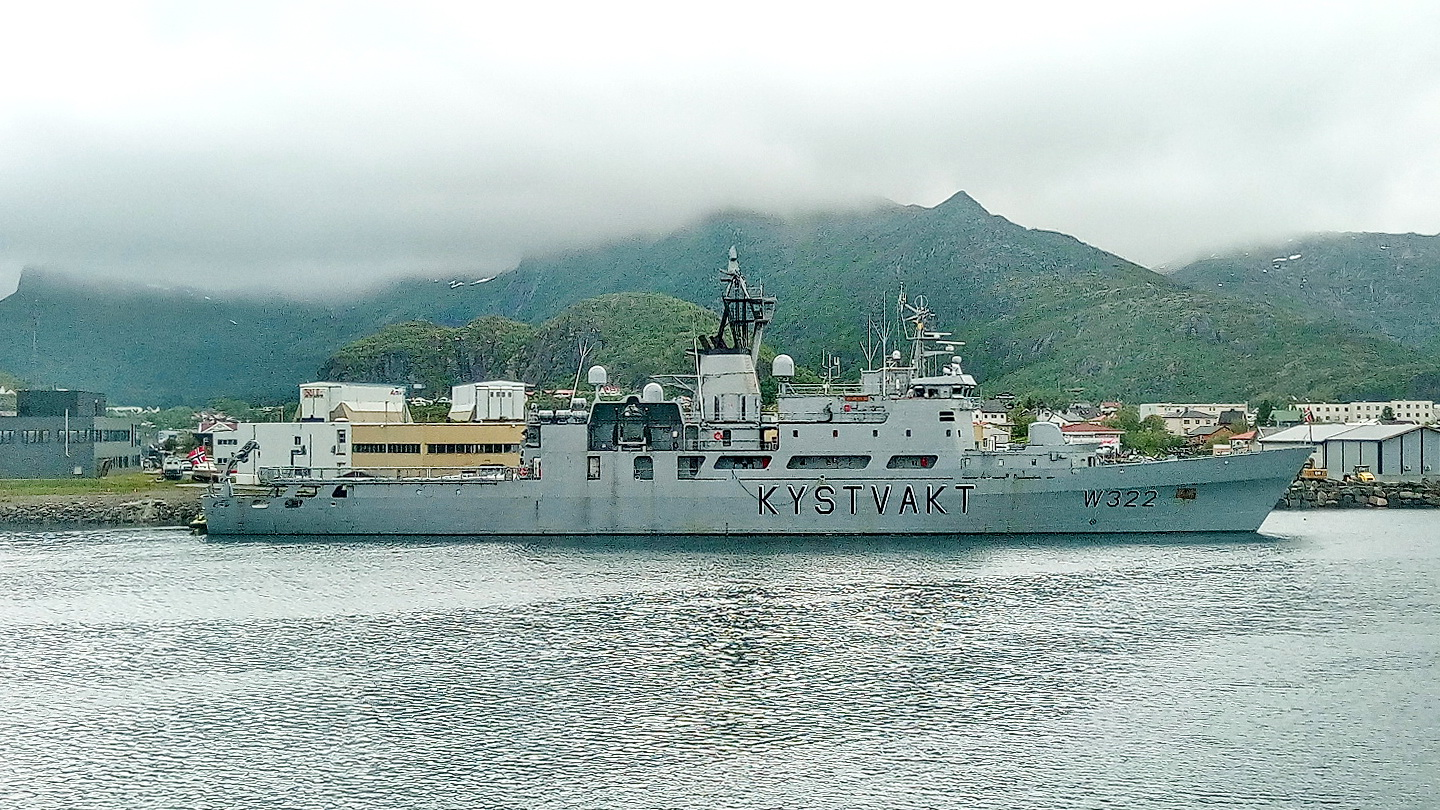 Kystvakt KV Andenes (W322) close to Svolvær (June 2018)